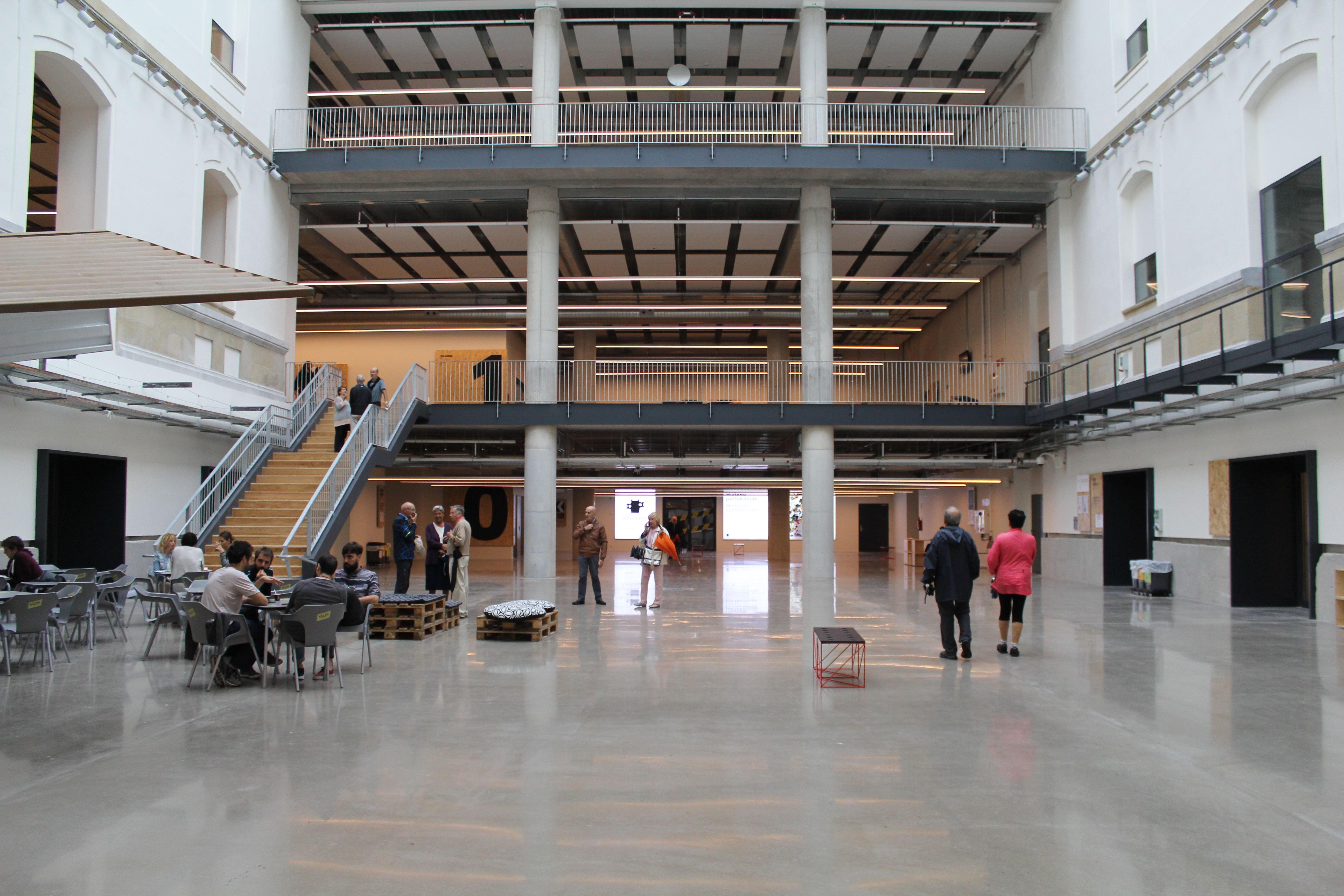 Vista del espacio de la Plaza de Tabakalera.